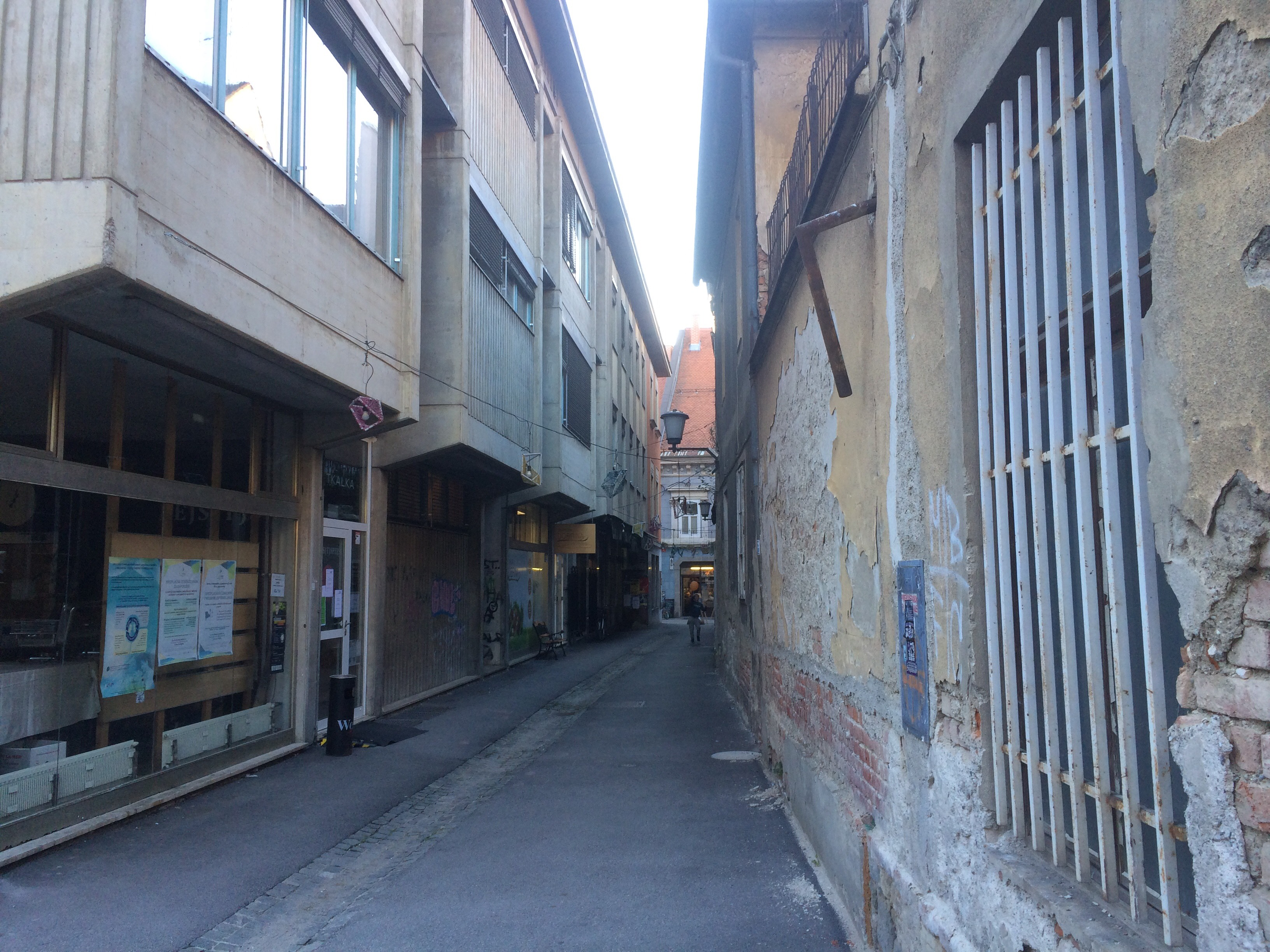 Pogled skozi Tkalski prehod na Vetrinjsko ulico.